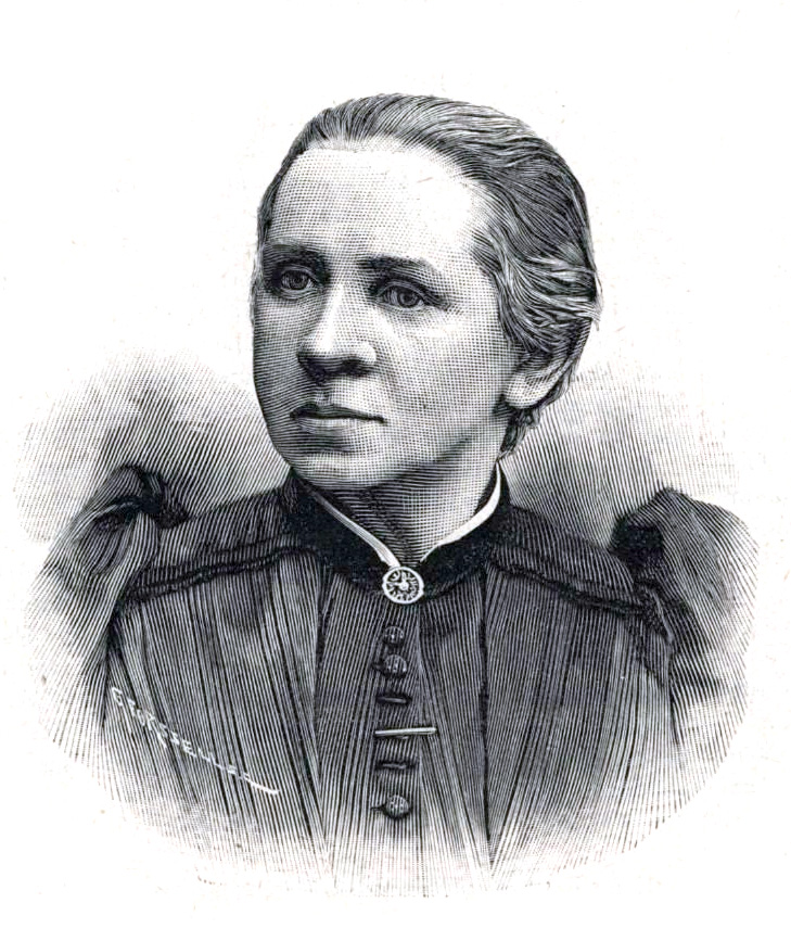 Eva Rodhe (1836-1919)